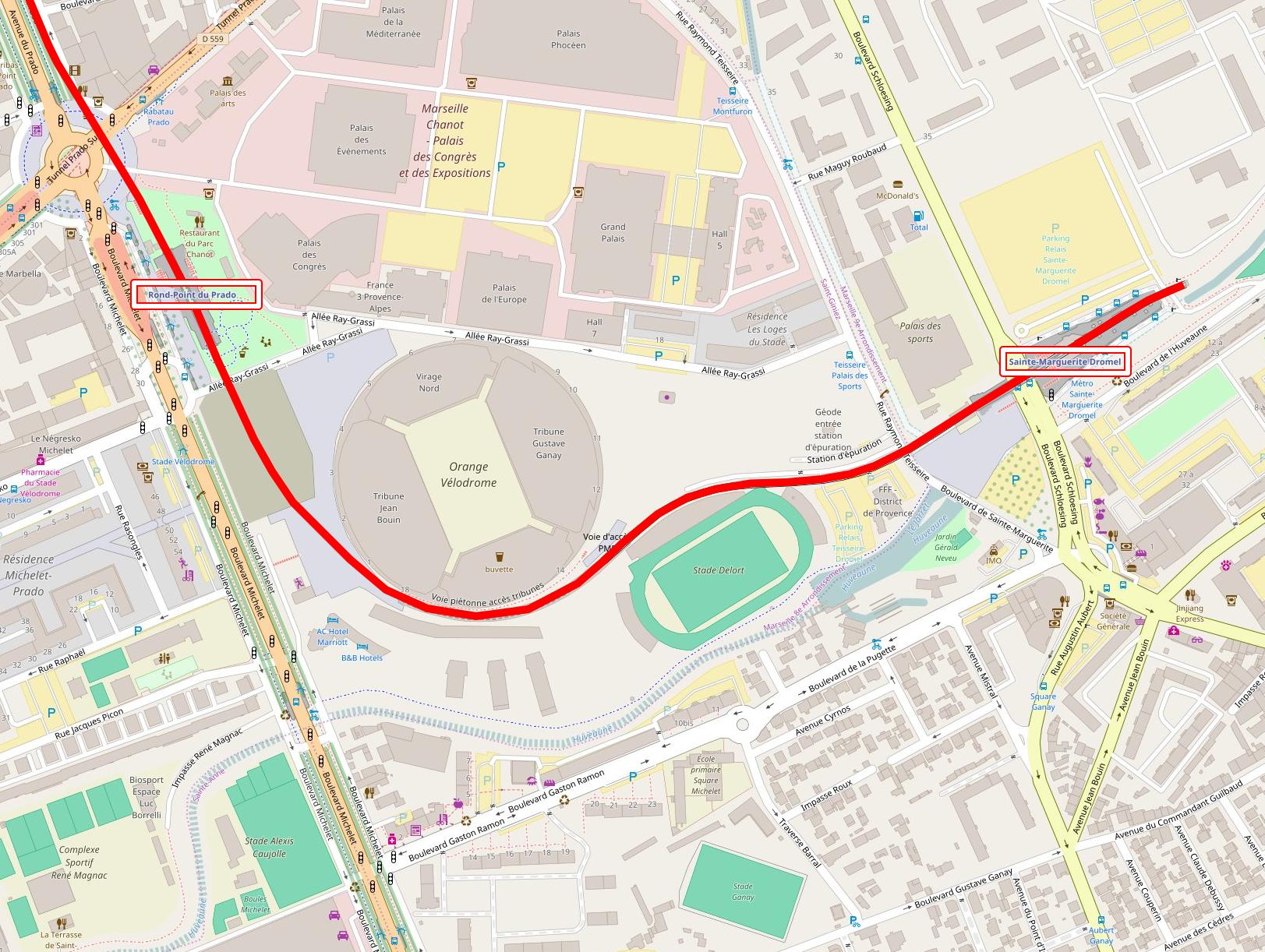 Stations de métro desservants le stade Vélodrome de Marseille